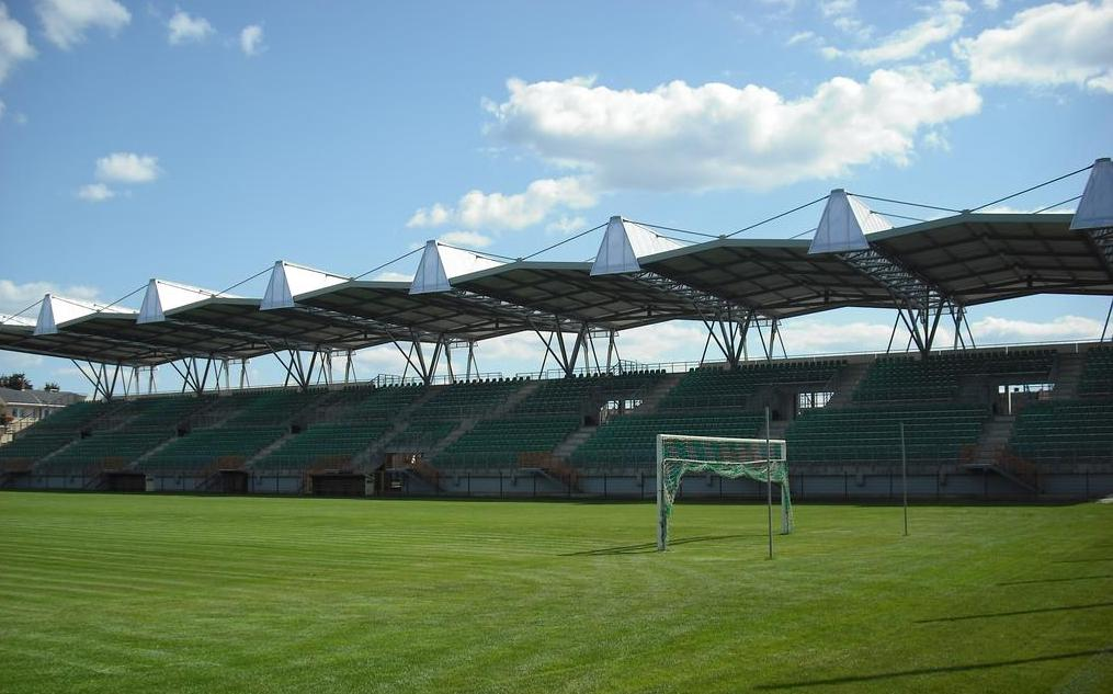 Stadion Siarki Tarnobrzeg